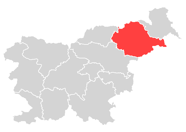 Podravska statistična regija